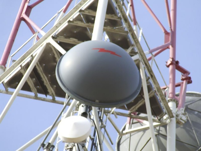 FH pour Rubis à Taingy dpt 89 (pylône France télécom)